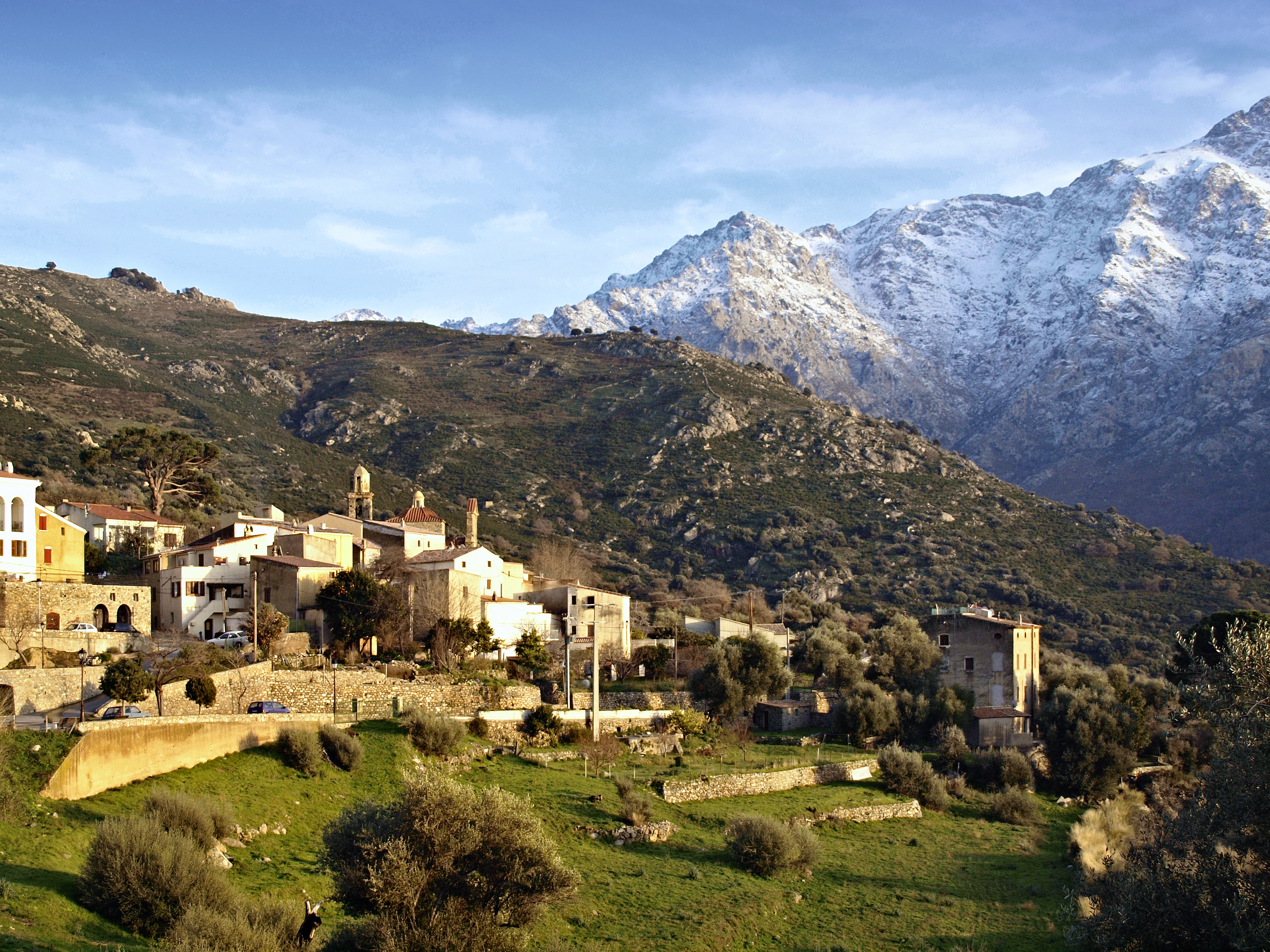 Montegrosso (Corsica) - Village de Lunghignano